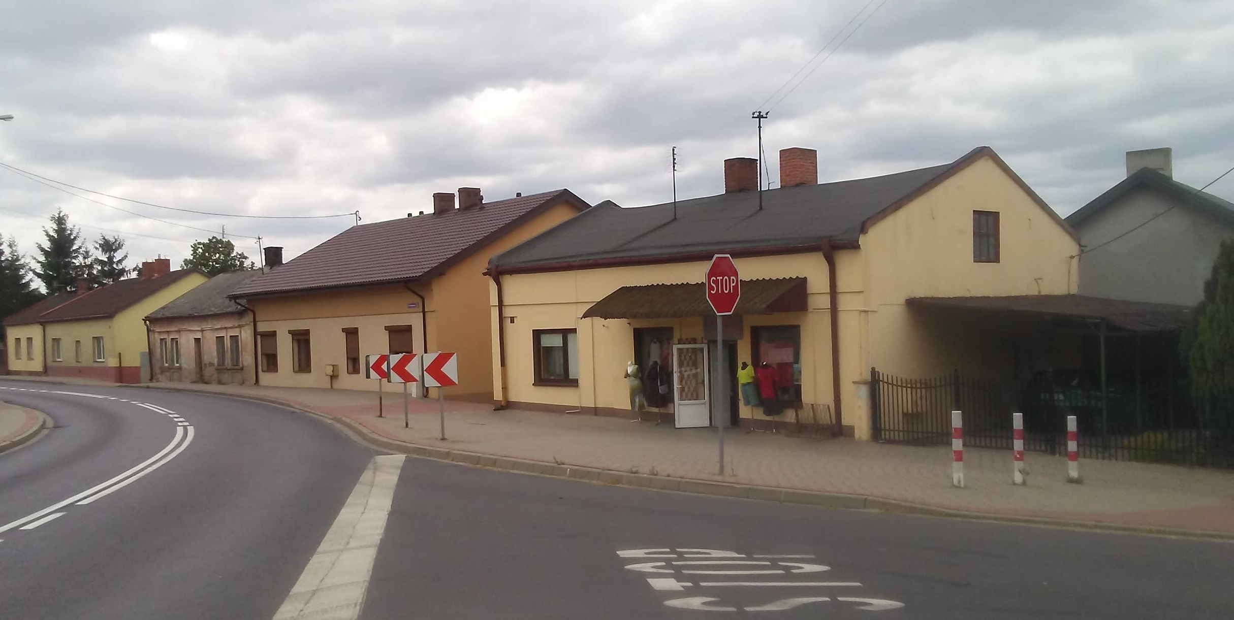 Brdów - widok na zabudowę małomiasteczkową